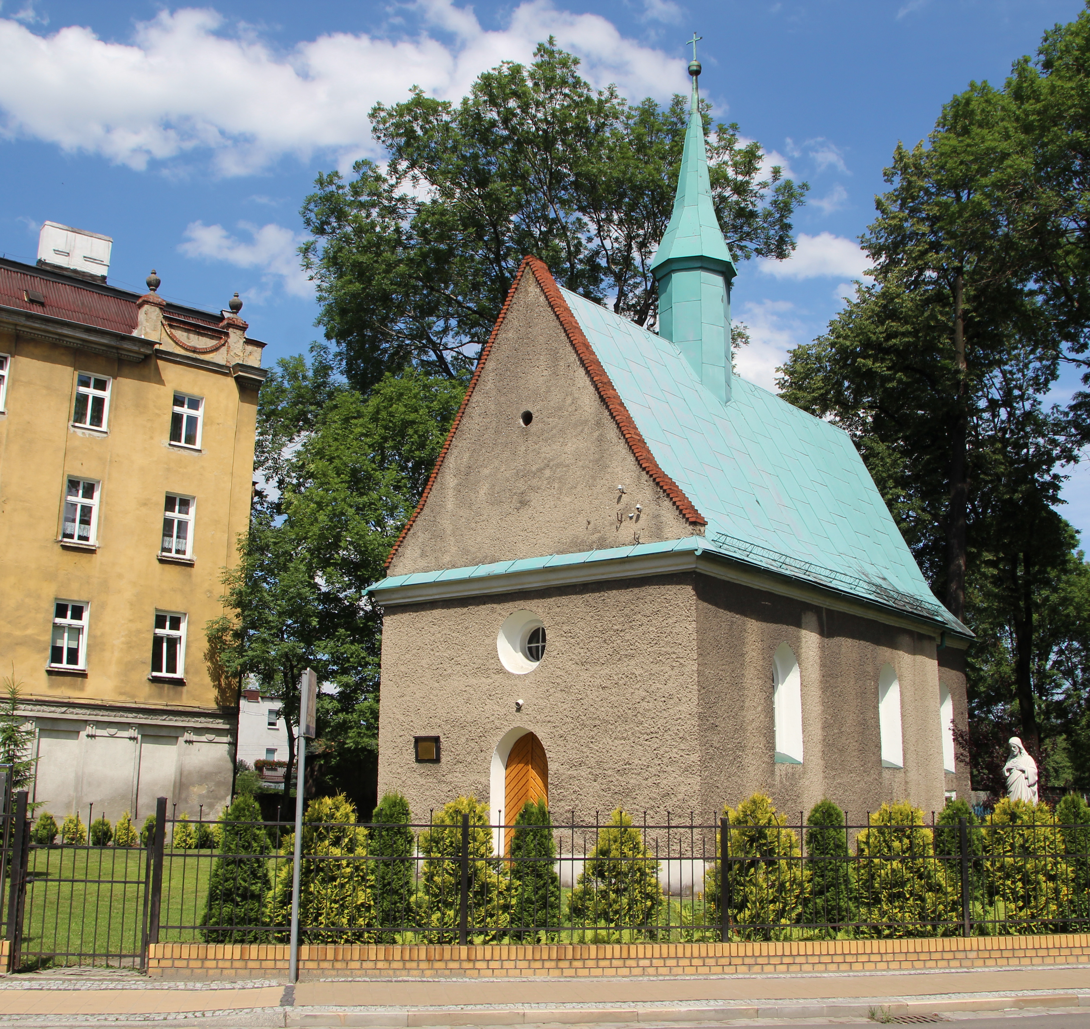 kościół cmentarny p.w. św. Rocha w Głuchołazach